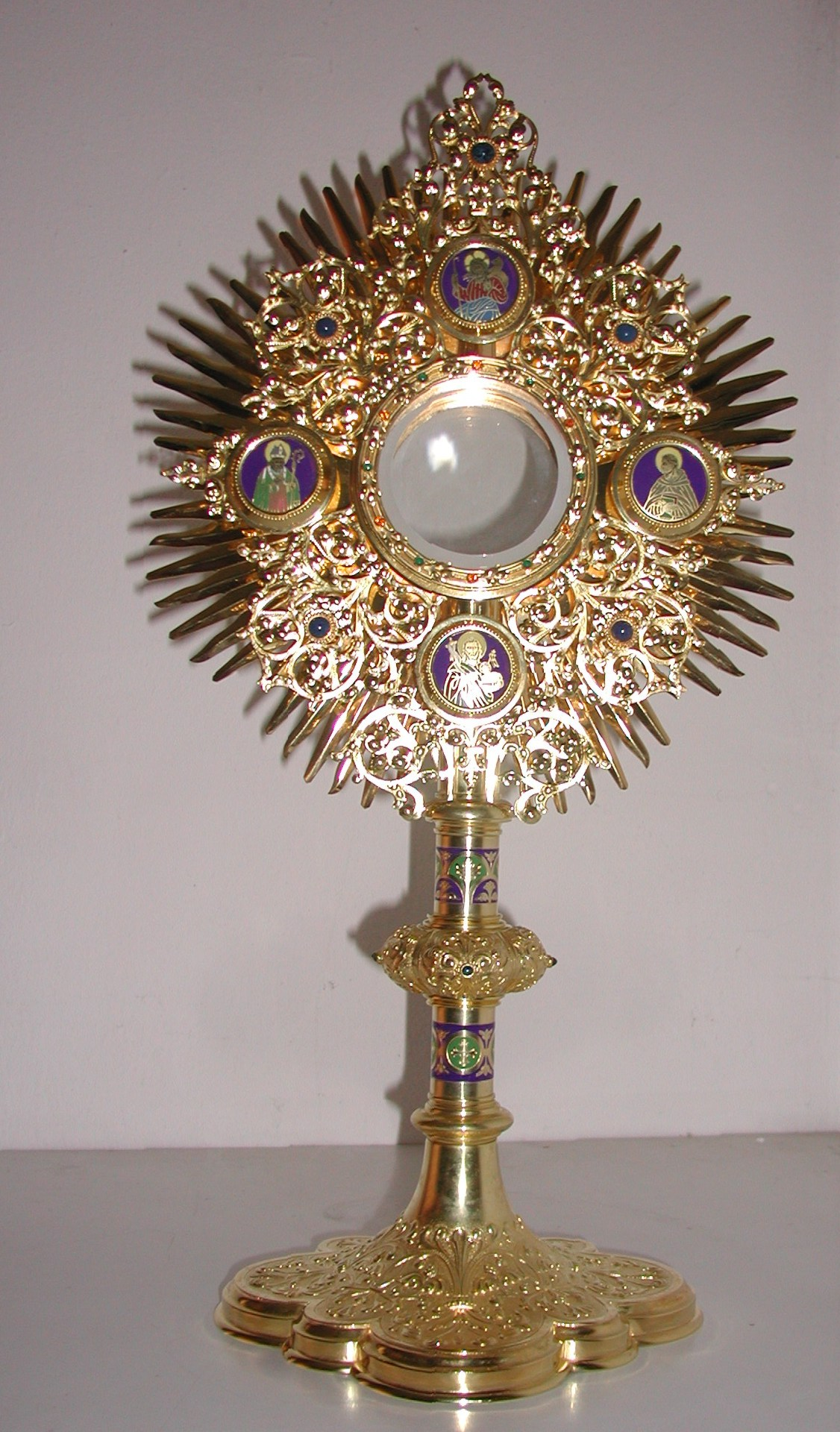 Die Monstranz aus der Kirche Zum Guten Hirten in Berlin-Friedrichsfelde